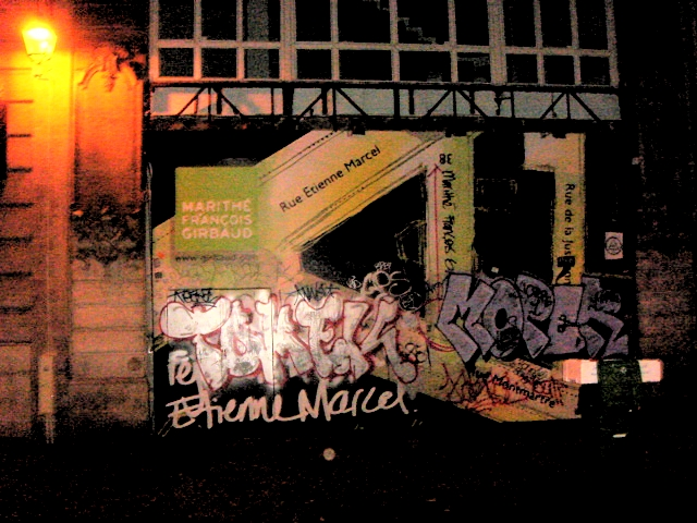 Boutique Maïté et François Girbaud. 38 Rue Étienne-Marcel, Paris, Ier arrondissement.